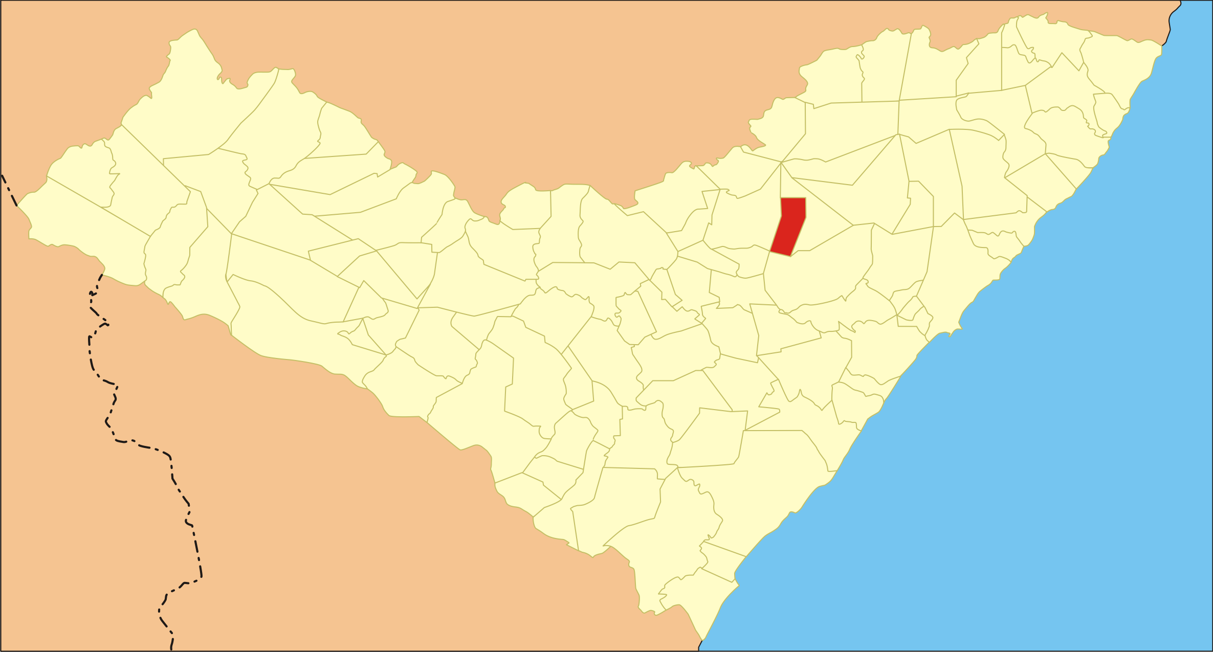 Localização da cidade no estado de Alagoas.